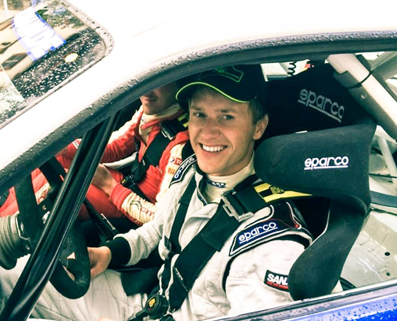 Nick Heilborn bei der Osterburgrallye in Weida 2016